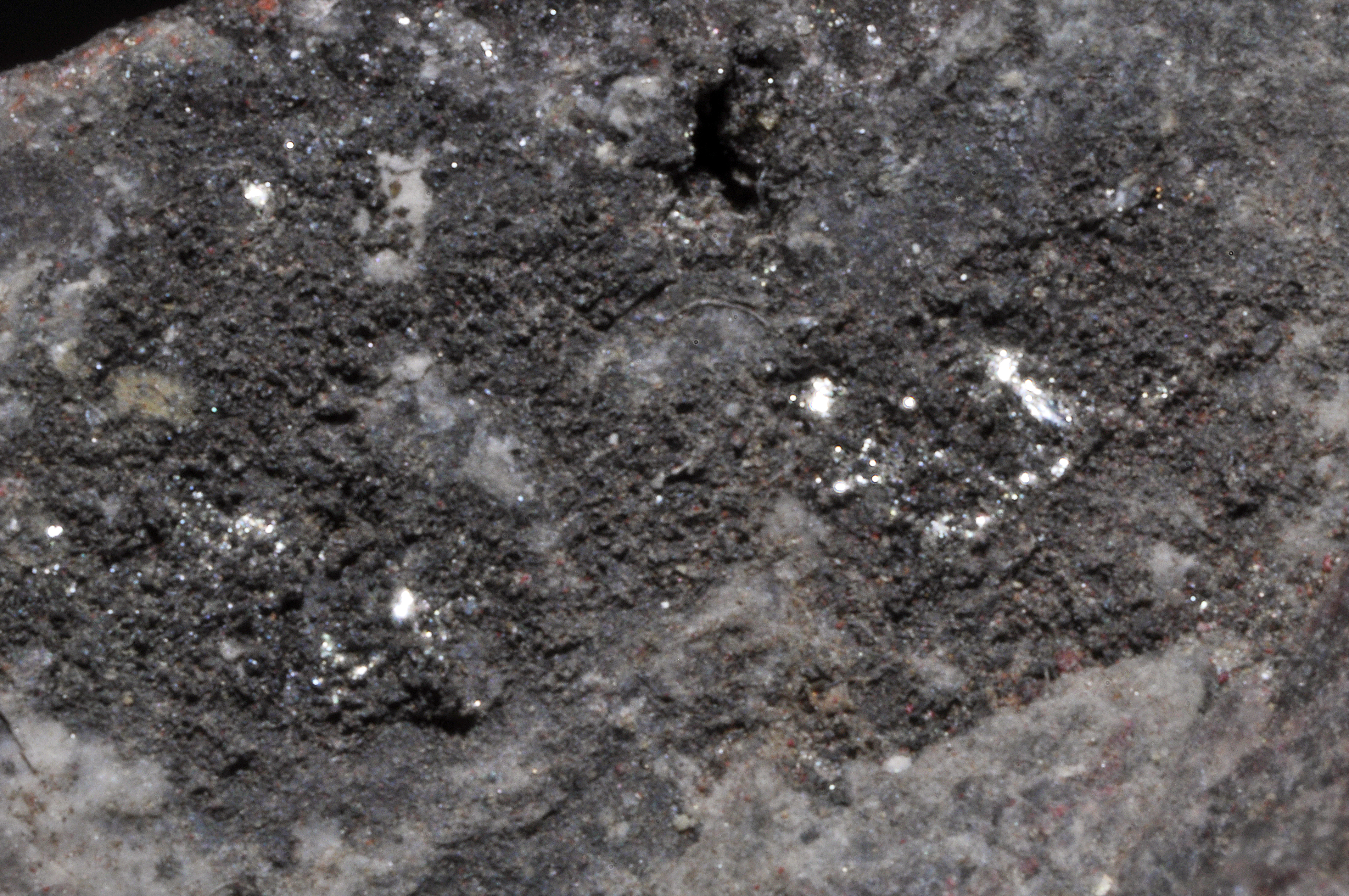 billes de mercure natif